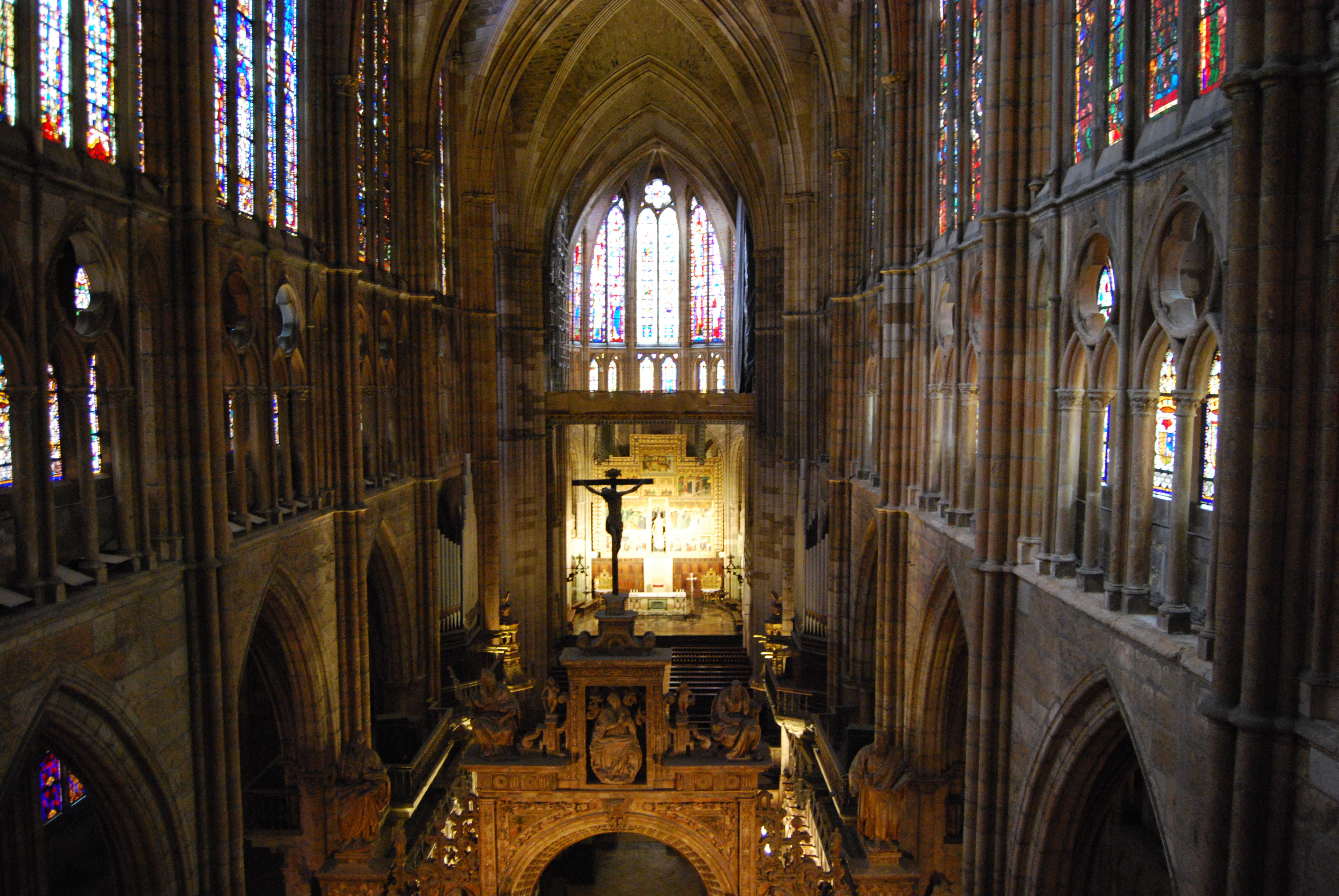 Nave central de la catedral de León desde una plataforma situada a la altura de las vidrieras medias, dedicada a visitas para ver el trabajo que realizan los restauradores.